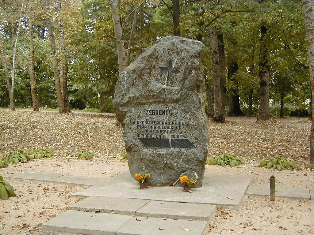 Zebrene, piemineklis sarkanā terora upuriem 2002-09-07